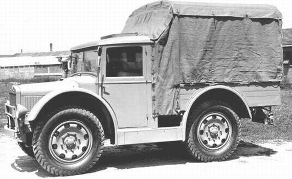 telonato